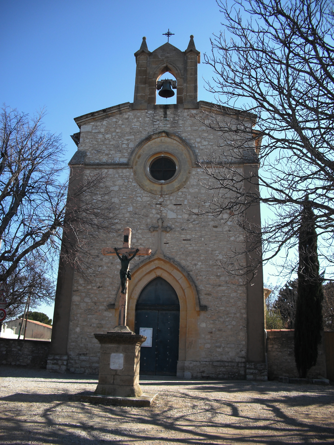 Église de l'Immaculée-Conception (Couteron, Aix-en-Provence)